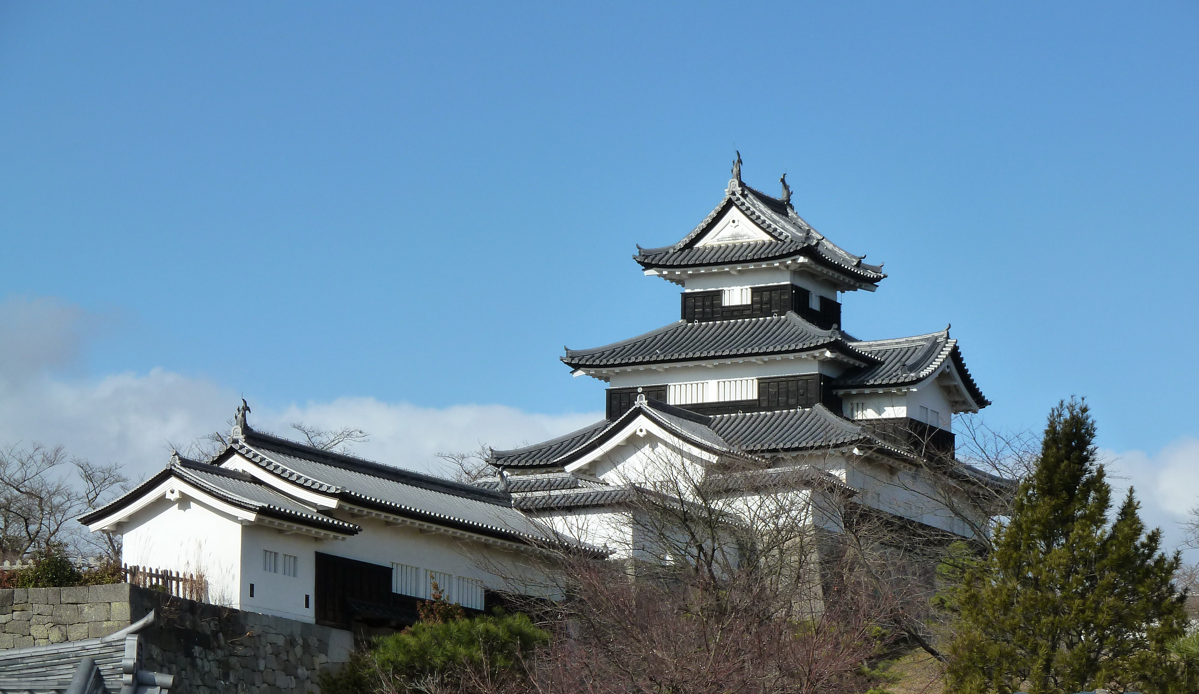 白河小峰城の三重櫓と前御門